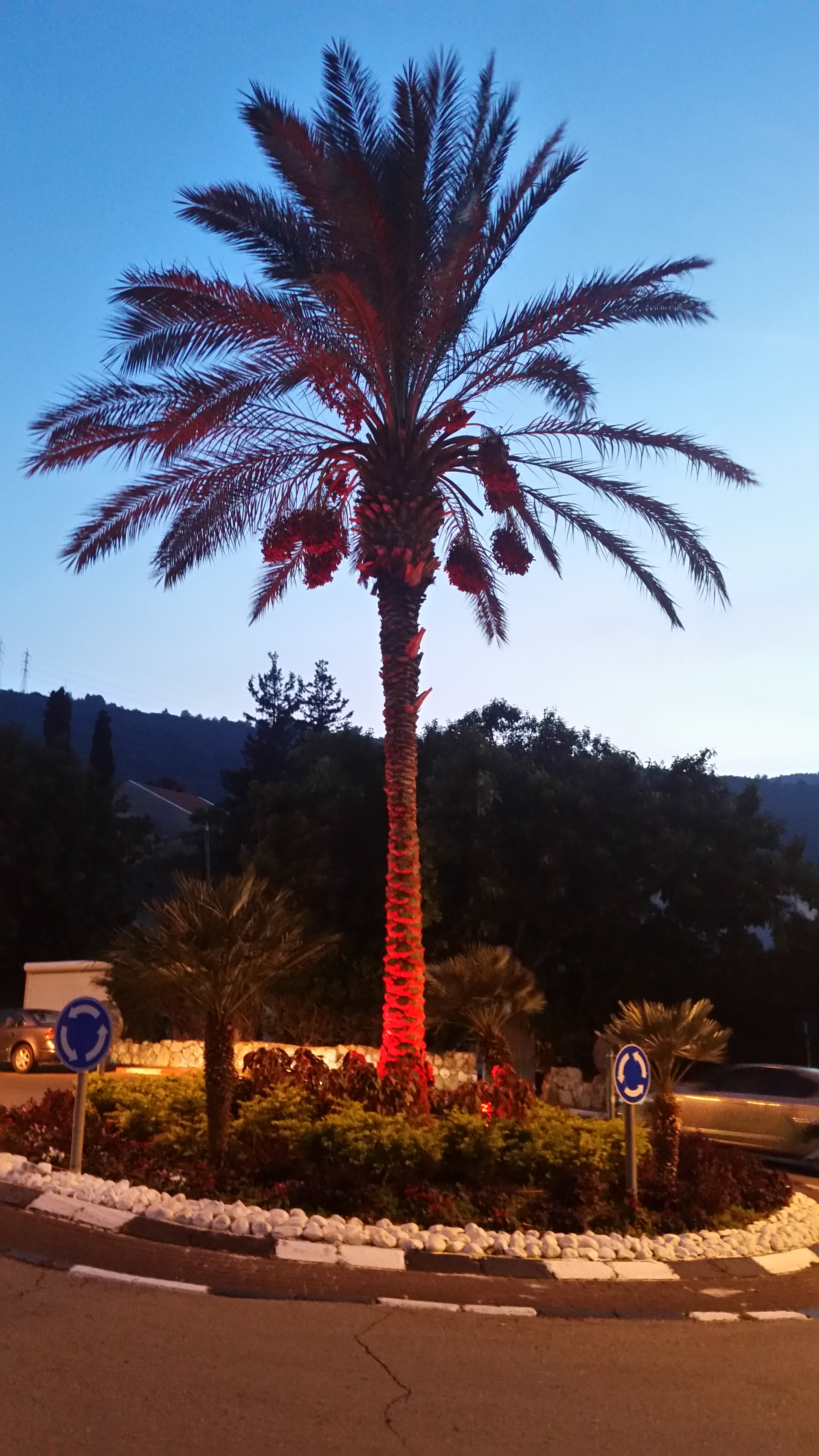 הכיכר היחידה בגבעת נשר שוכנת בצומת הרחובות יפה נוף, ההשכלה, החלוצים והעליה